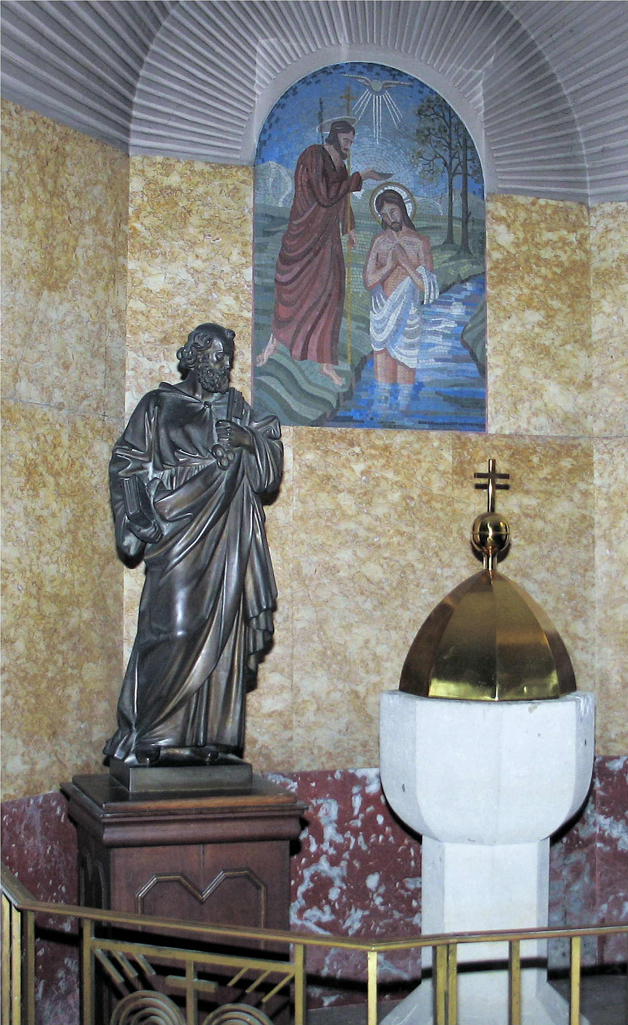 Daafkapell an der Kierch zu Beetebuerg